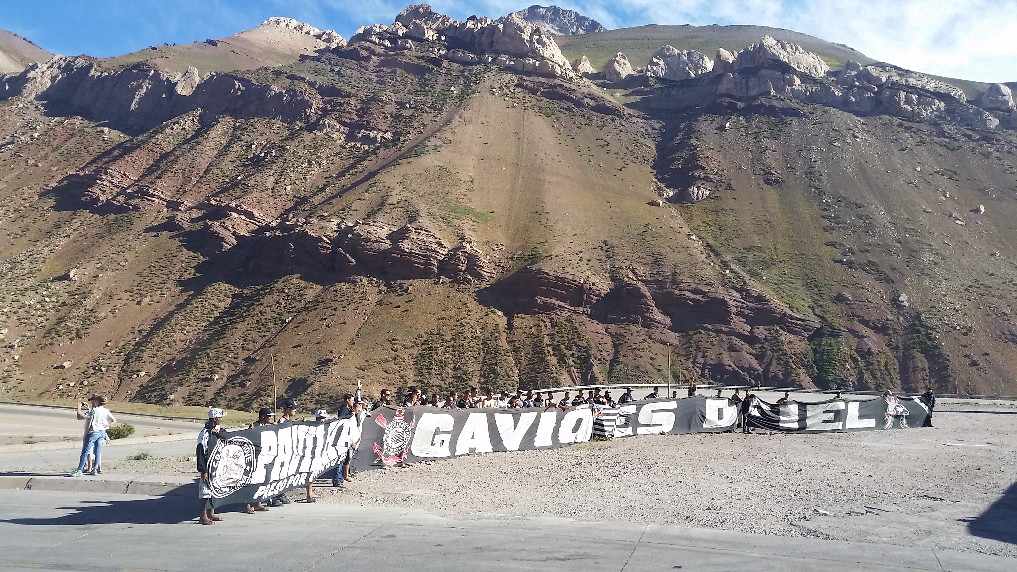 Gaviões da Fiel fans אוהדי Gaviões da Fiel